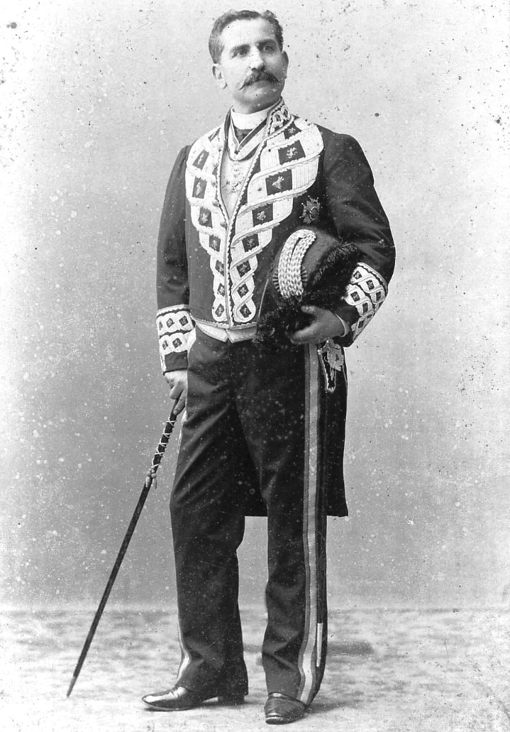 José Riguera Montero, fotografía en Vida Gallega 1923